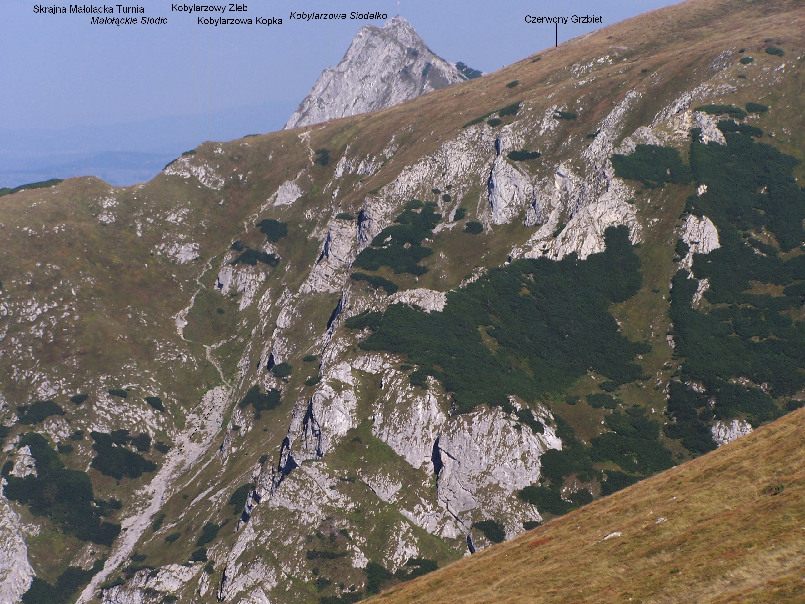 Widok od zachodniej strony